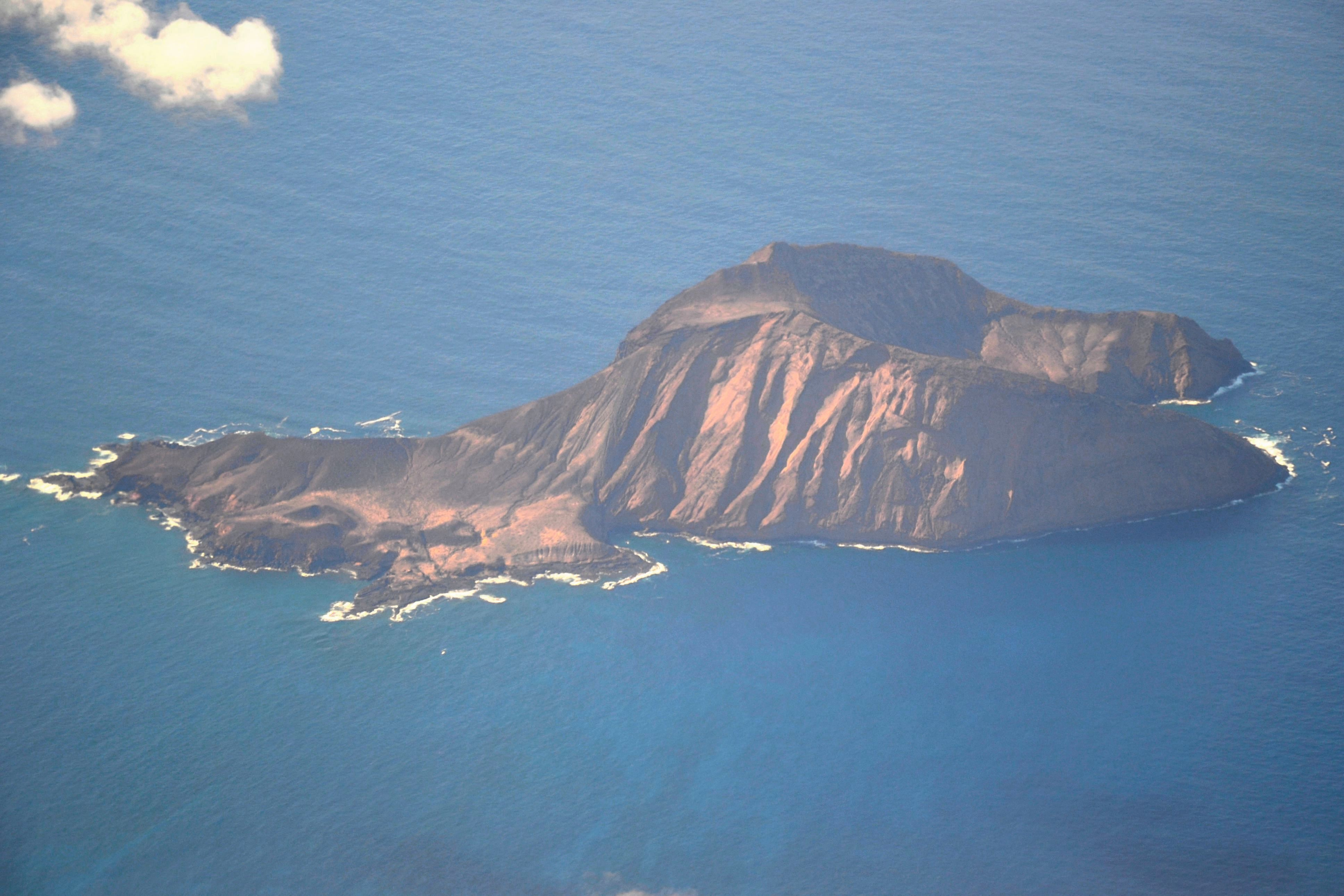 Montaña Klara, unbewohnte Insel im Chinij-Archipel vor der Kanareninsel Lanzarote